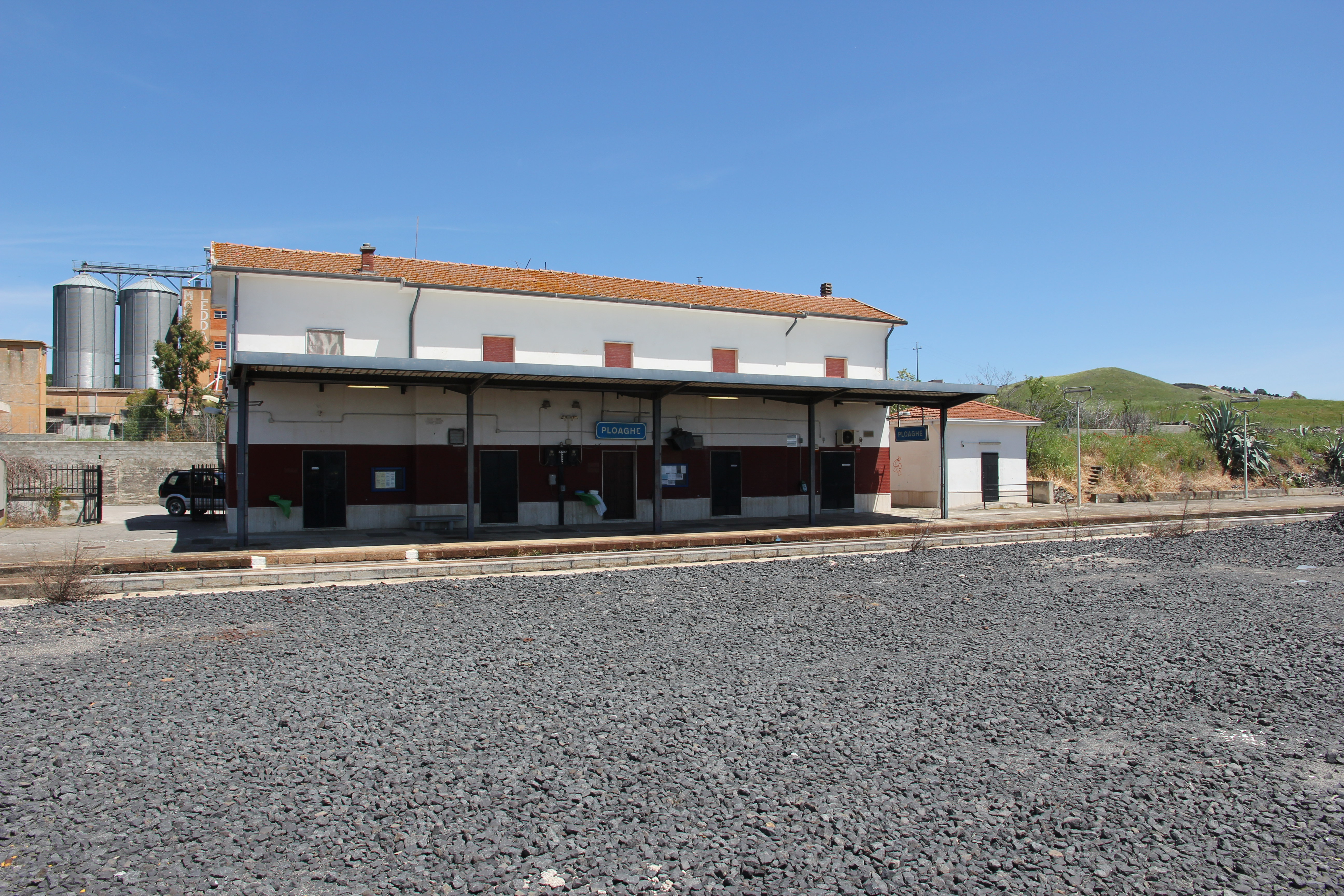 Ploaghe - Stazione ferroviaria